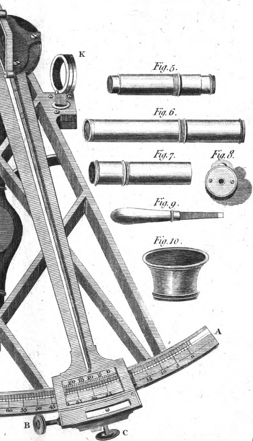 Abbildung aus dem Buch von George Adams: Geometrische und graphische Versuche. London 1795